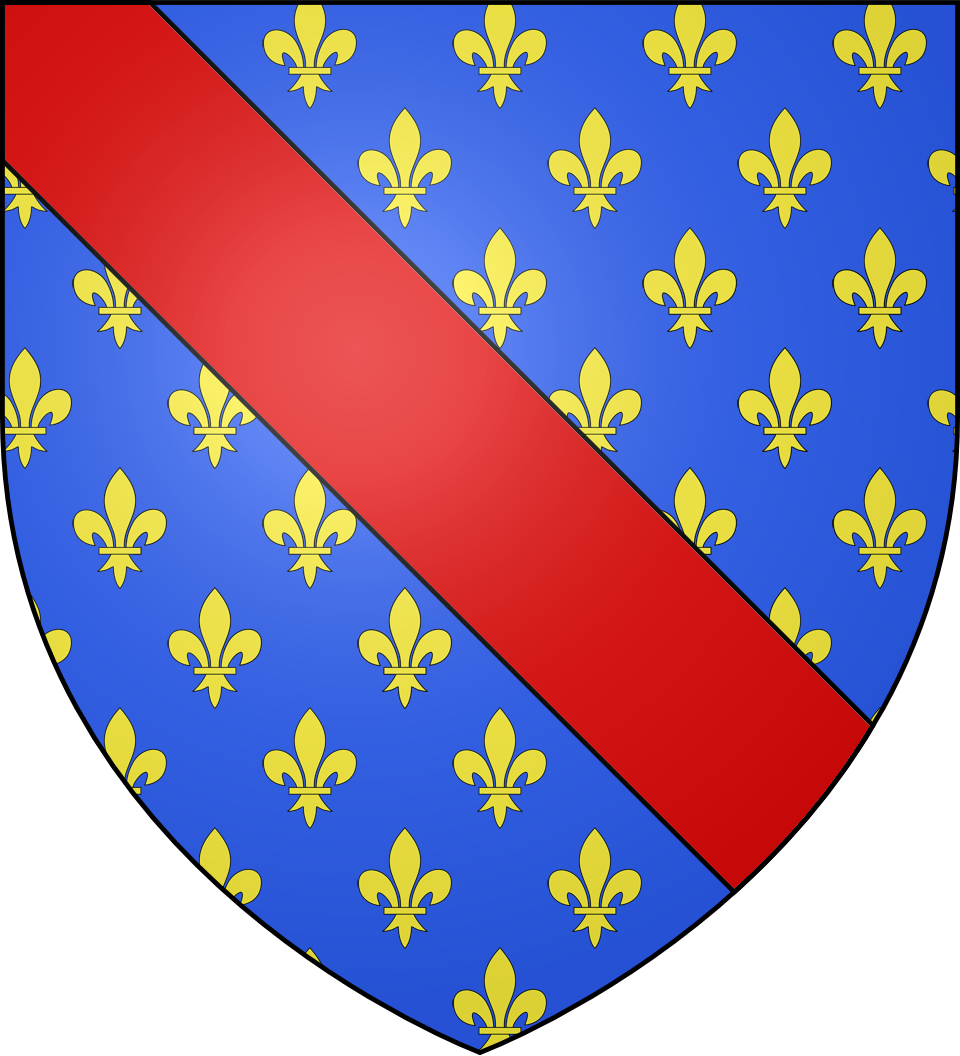 Blason du comté de Clermont-en-Beauvais (Bourbon) : d'azur semé de fleurs de lys d'or à la bande de gueules